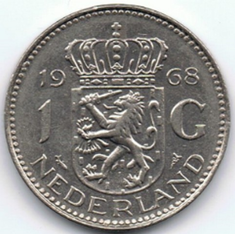 Gulden